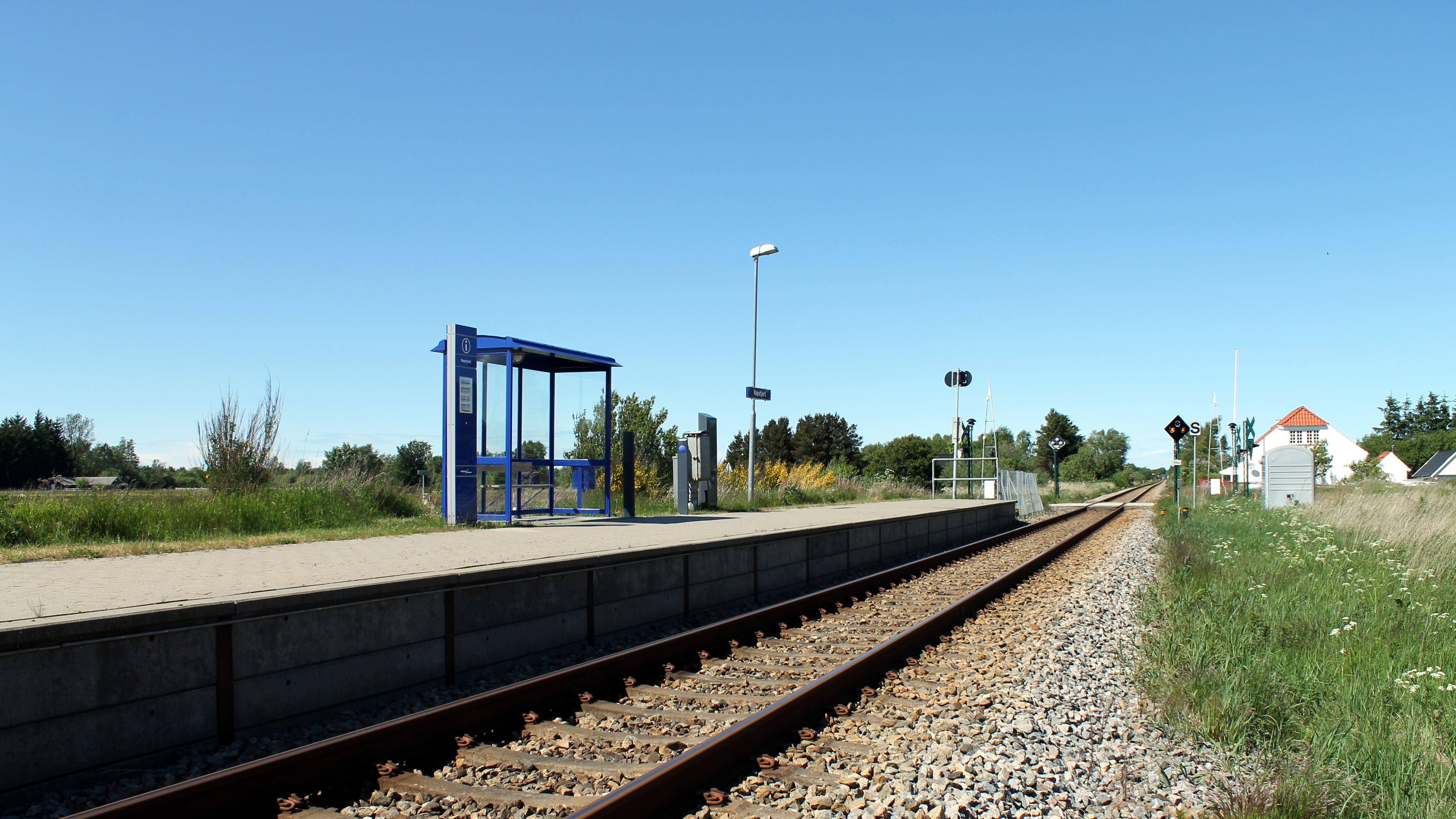 Skagensbanen - Napstjert Trinbræt